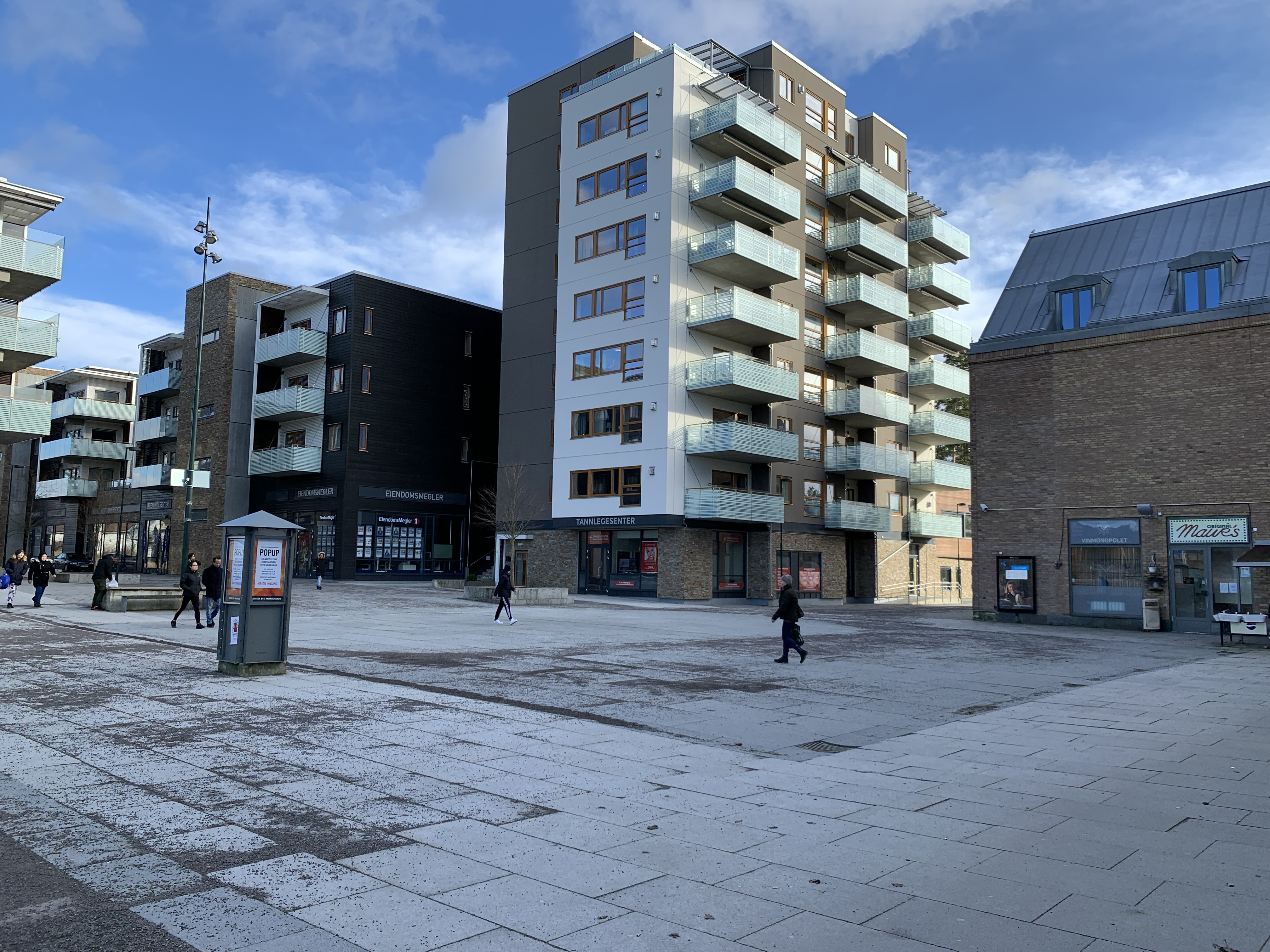 Thorleif Kleves torg på Mortensrud i Oslo.